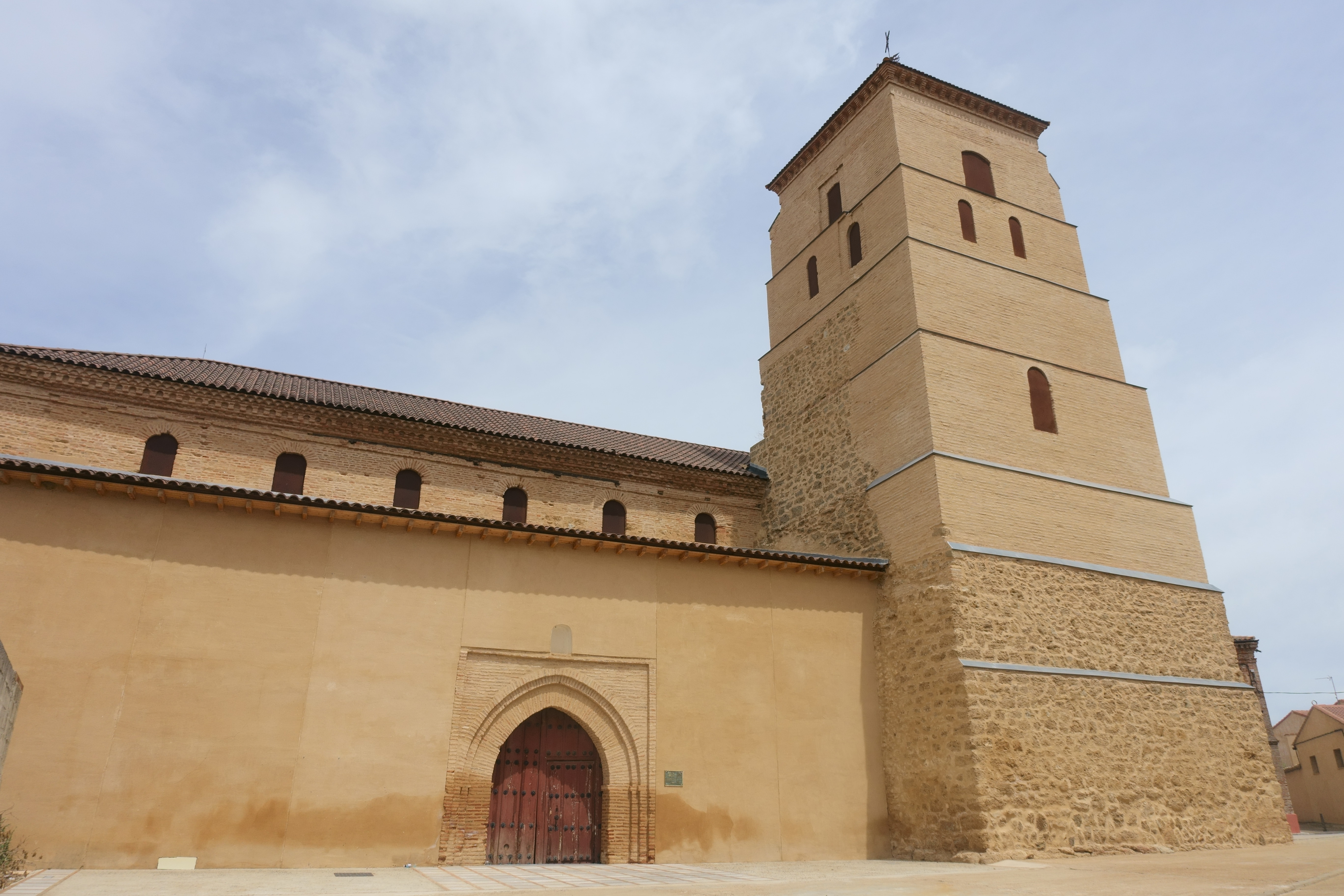 Iglesia de Santa María del Mercado, Mayorga (Valladolid, España).